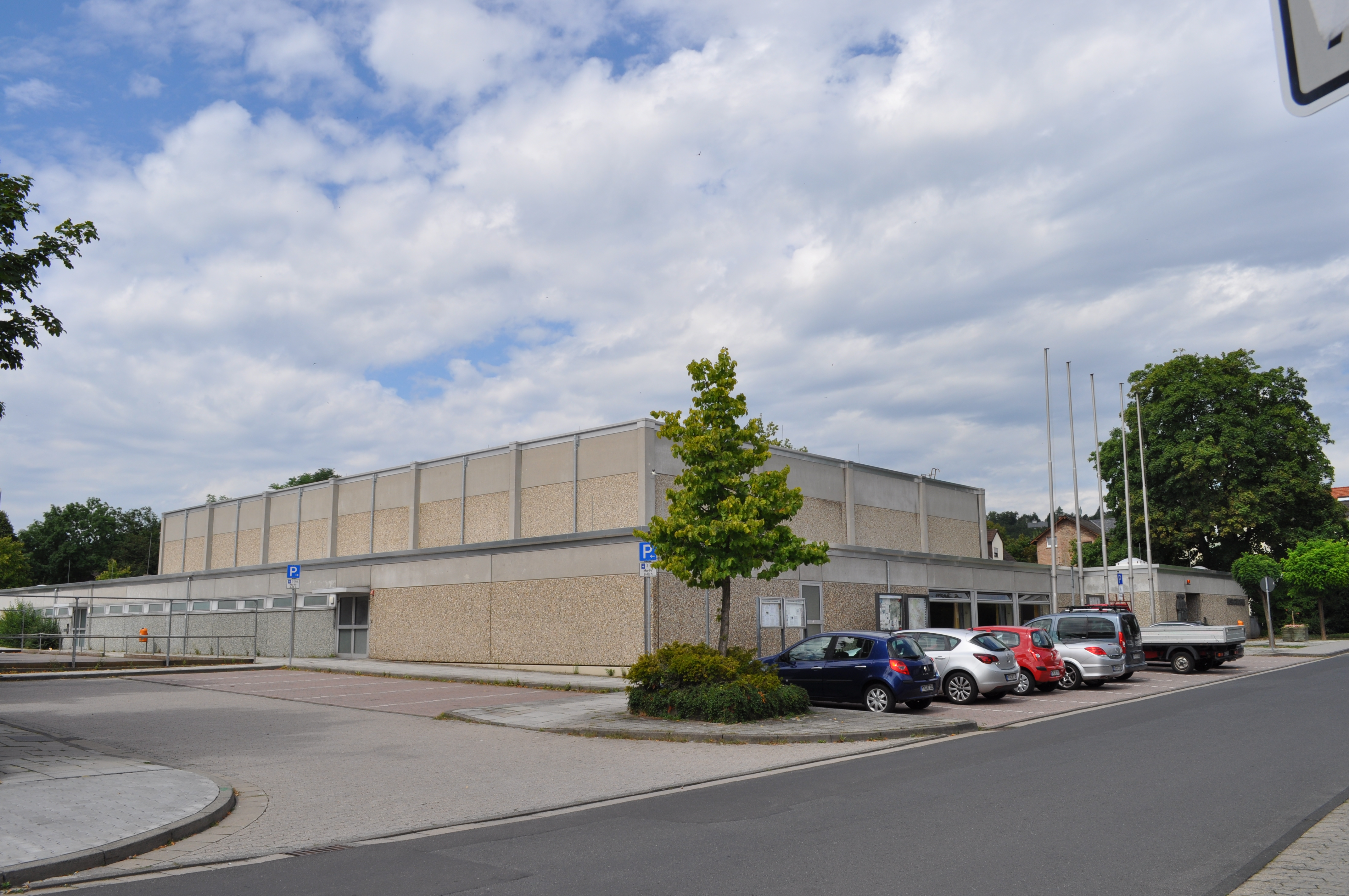 Bad Soden, Hasselgrundhalle